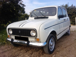 Foto de mi 4l en el campo 1.1. año 1987